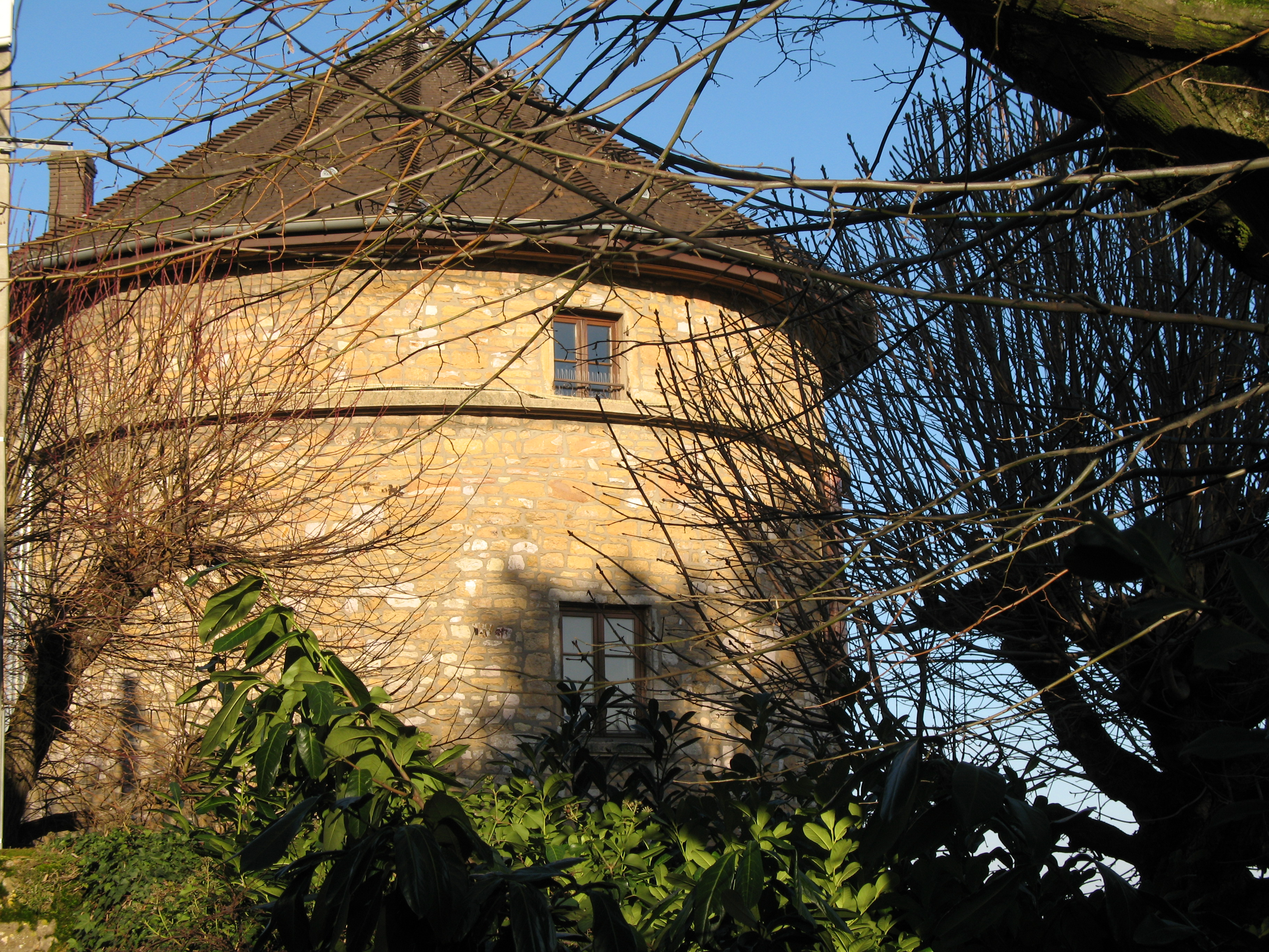 Tour Rissler, à proximité de la Croix Rampau, sur la commune de Poleymieux-au-Mont-d'Or